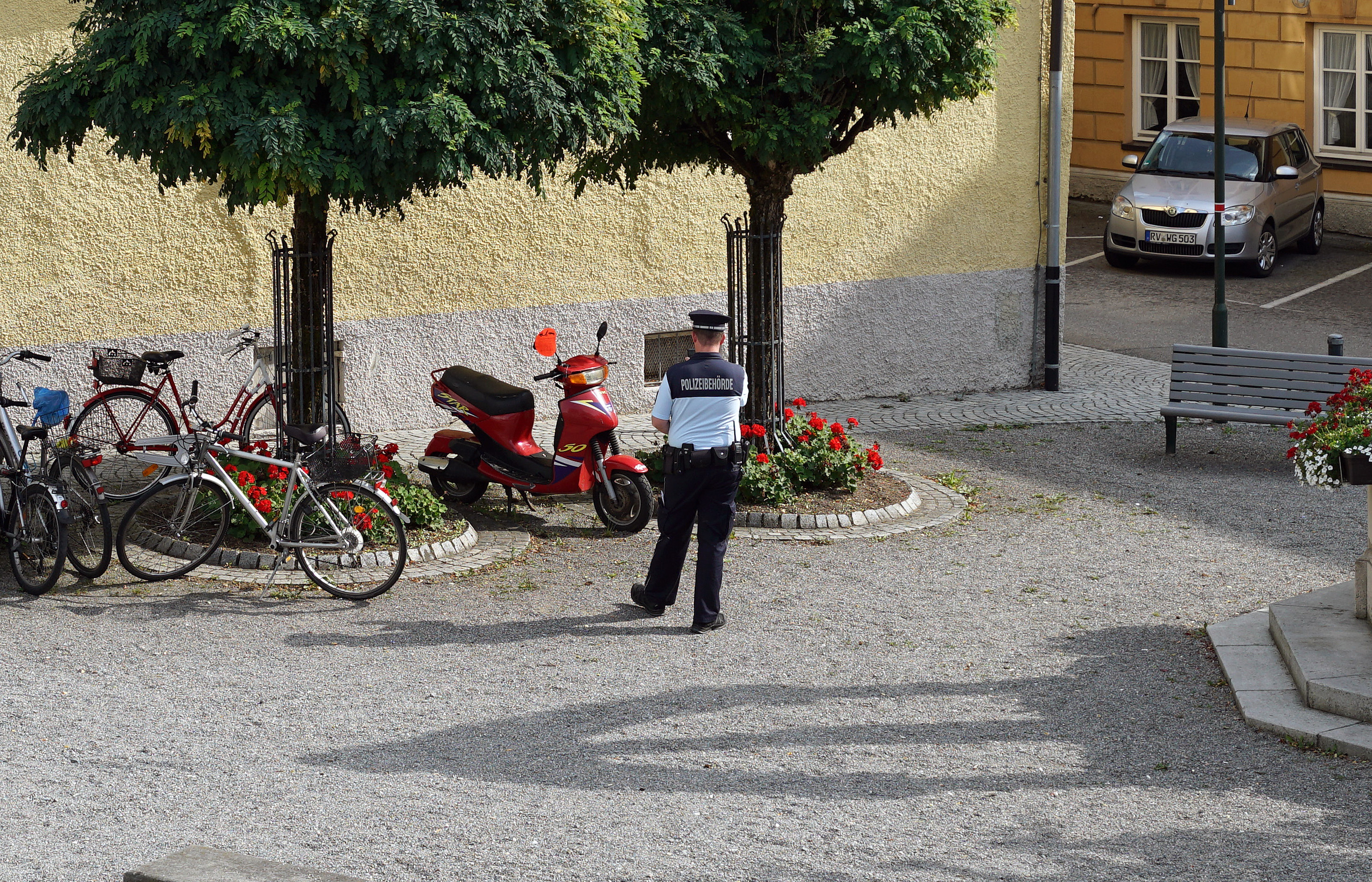 Ein Mitarbeiter einer Polizeibehörde dokumentiert auf dem Gut-Betha-Platz in Bad Waldsee in Baden-Württemberg eine Ordnungswidrigkeit: Das markierte Kraftfahrzeug, das ohne Kraftfahrzeug- und Versicherungskennzeichen abgestellt ist und nicht zum Straßenverkehr zugelassen ist, nimmt öffentlichen Verkehrsraum über den Gemeingebrauch hinaus in Anspruch. Diese unerlaubte Sondernutzung wird als Ordnungswidrigkeit eingestuft, die aufgrund § 16 und § 54 Straßengesetz für Baden-Württemberg mit einer Geldbuße geahndet wird. Mit dem angebrachten roten und runden Zettel wird die Halterin/der Halter aufgefordert, das mit diesem Zettel versehene Fahrzeug innerhalb einer Woche zu entfernen, ansonsten wird es kostenpflichtig abgeschleppt werden. Fotografien können auch als Sachbeweise zugelassen werden.